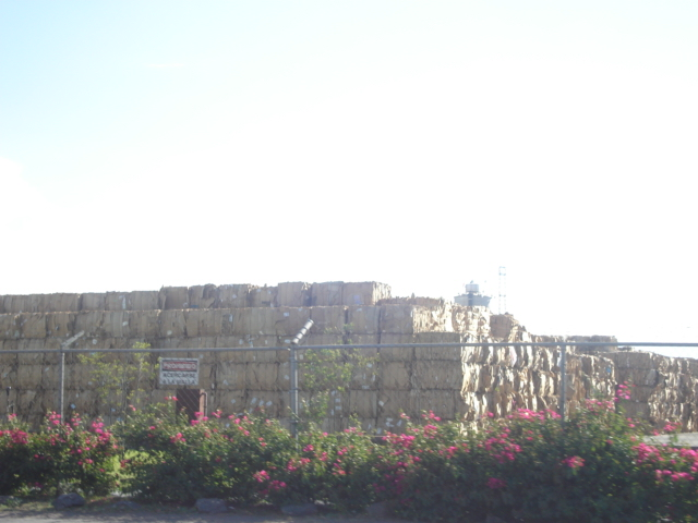 Empresa de Cartones